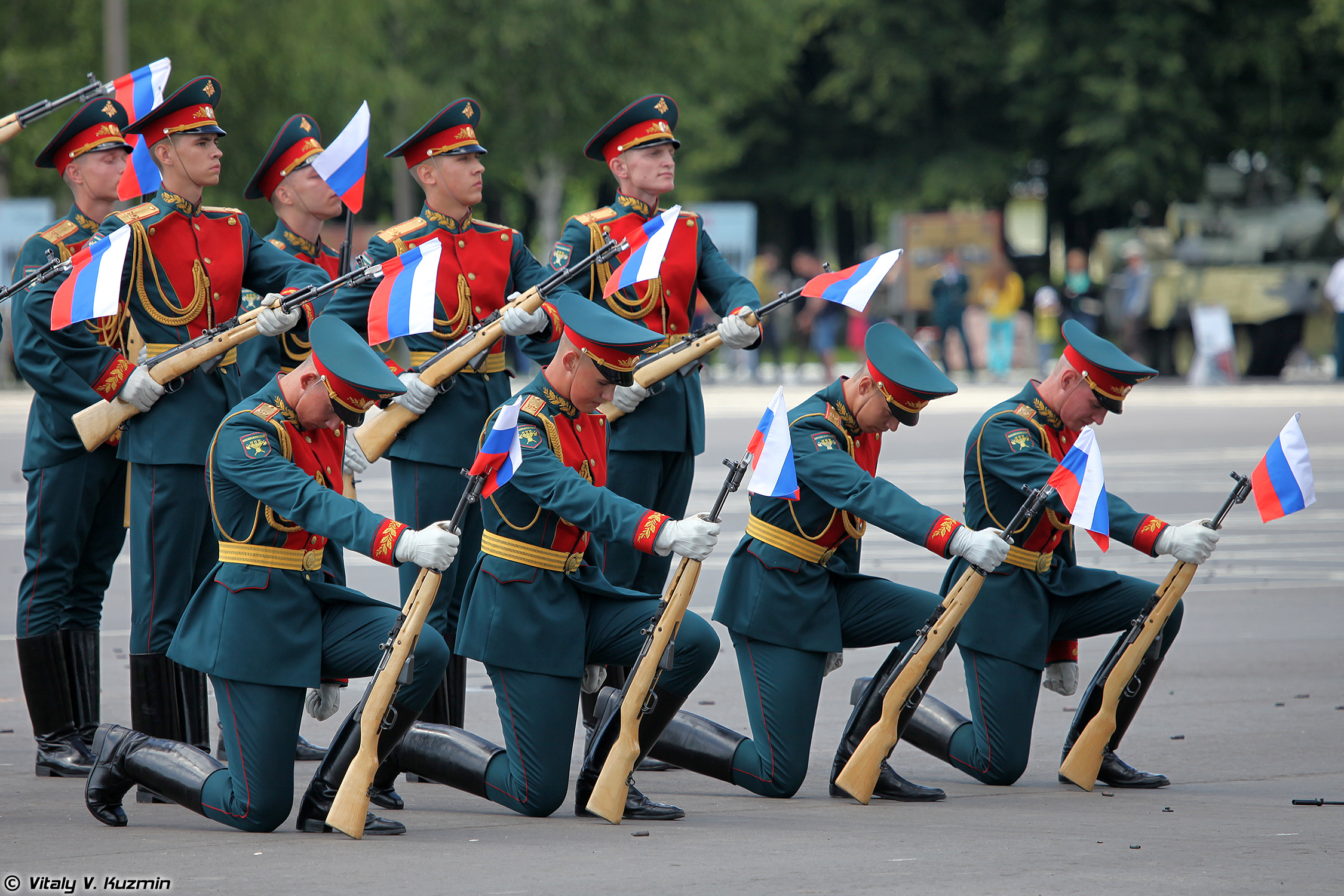 Выступление роты почётного караула 154-го отдельного комендантского Преображенского полка (154th Separate Preobrazhensky Commandant Regiment Honour Guards show)